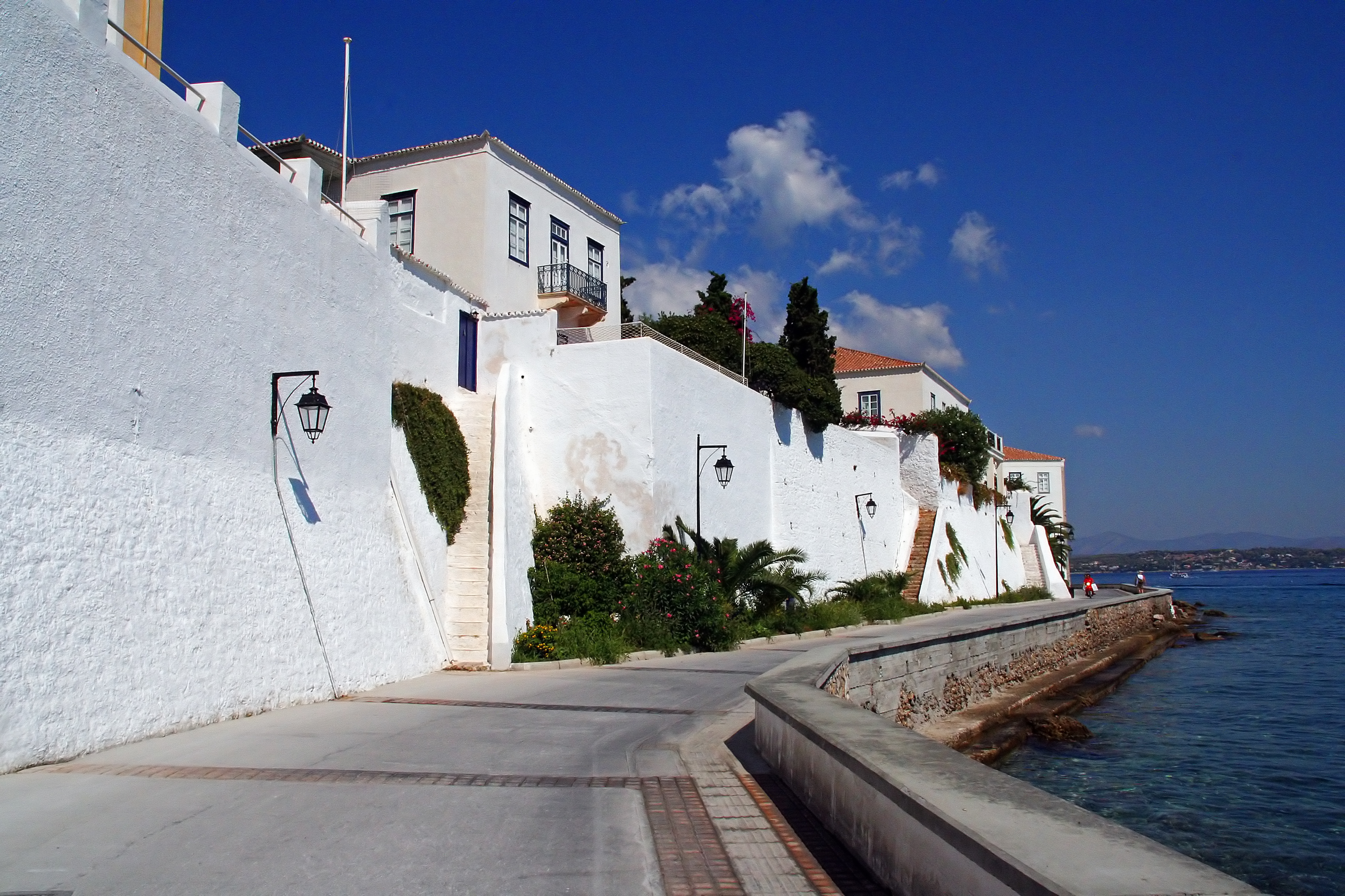 Spetses7